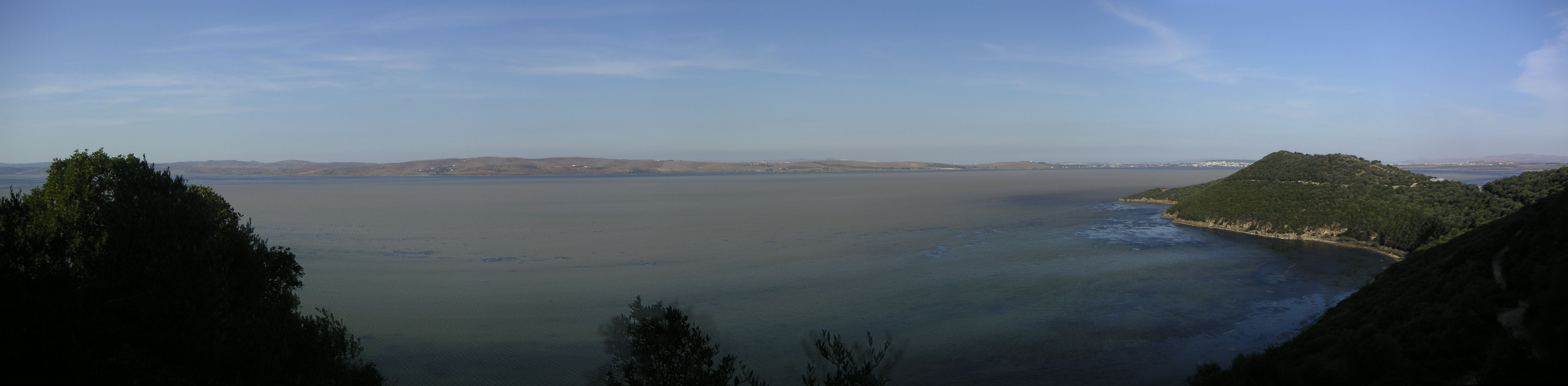 Iskul-tó panoráma látképe az Iskul-hegyről, Tunézia